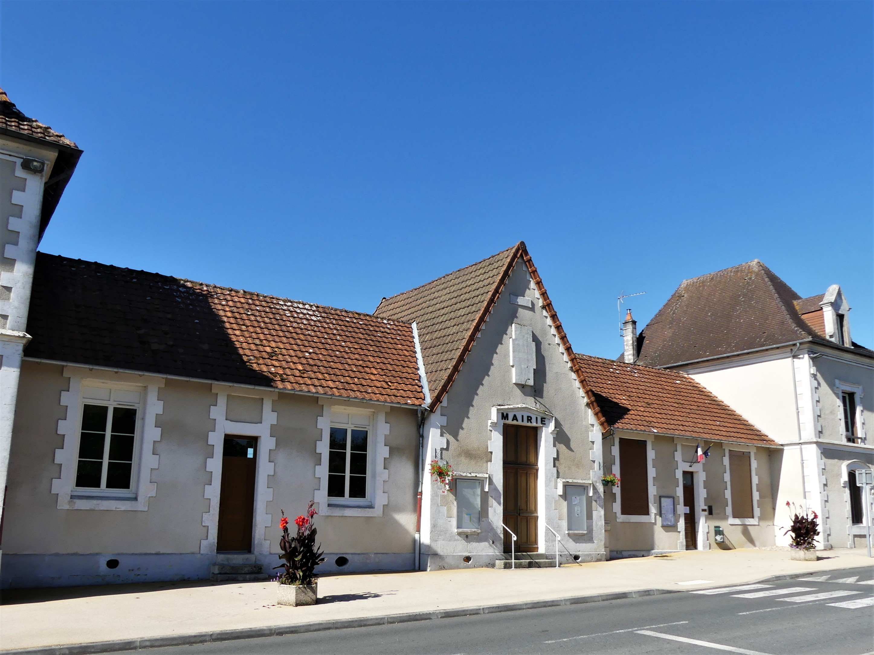 La mairie de Saint-Priest-les Fougères, Dordogne, France.